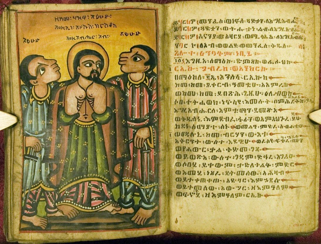 Eliza Codex 23 - Ethiopian biblical manuscript